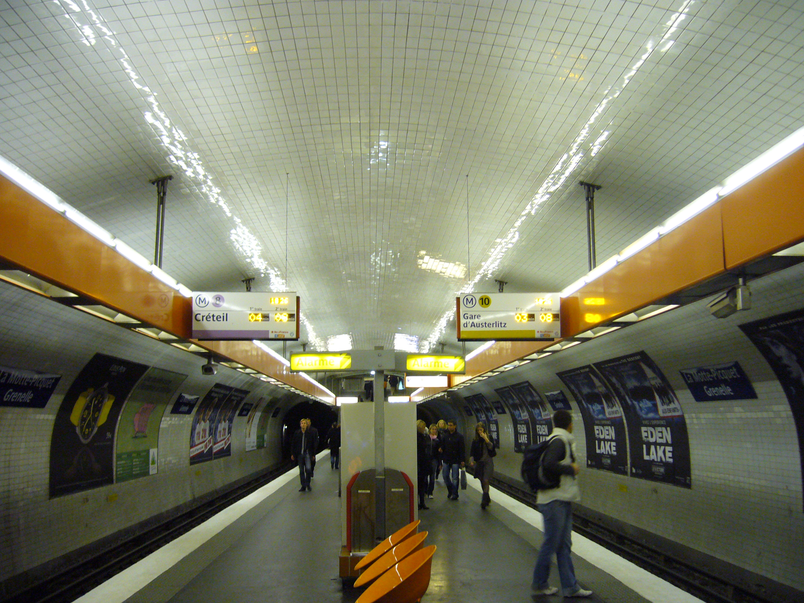 Vue des quais de la ligne 8 en direction de Pointe du Lac et 10 en direction de Gare d'Austerlitz à la station La Motte-Picquet - Grenelle du métro de Paris.